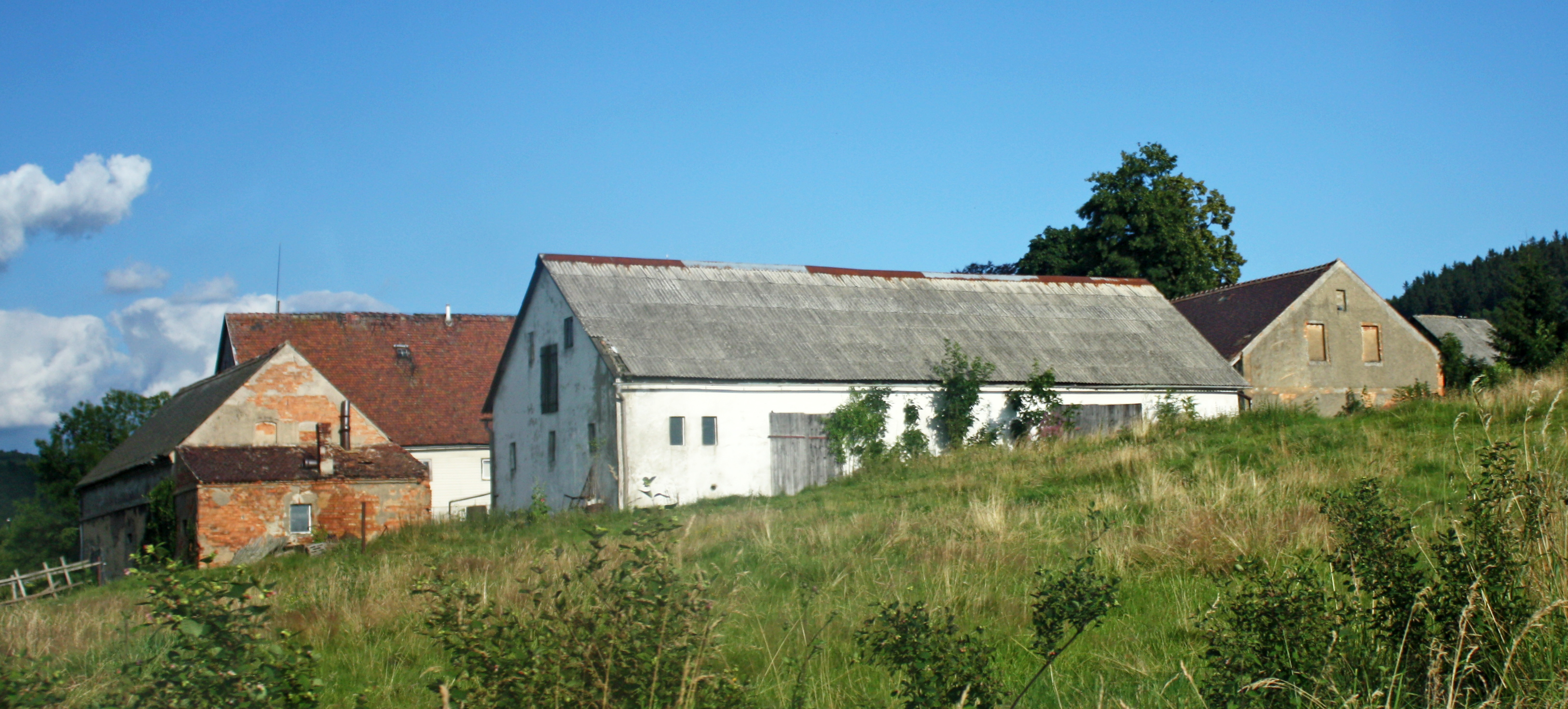 This photo of Lower Silesian Voivodeship was taken during Wikiexpedition 2013 set up by Wikimedia Polska Association.You can see all photographs in category Wikiekspedycja 2013. Permission=Ludwig Schneider put it under GFDL and Creative Commons Attribution ShareAlike 3.0,2.5,2.0,1.0 and cc-by-sa-4.0 - self